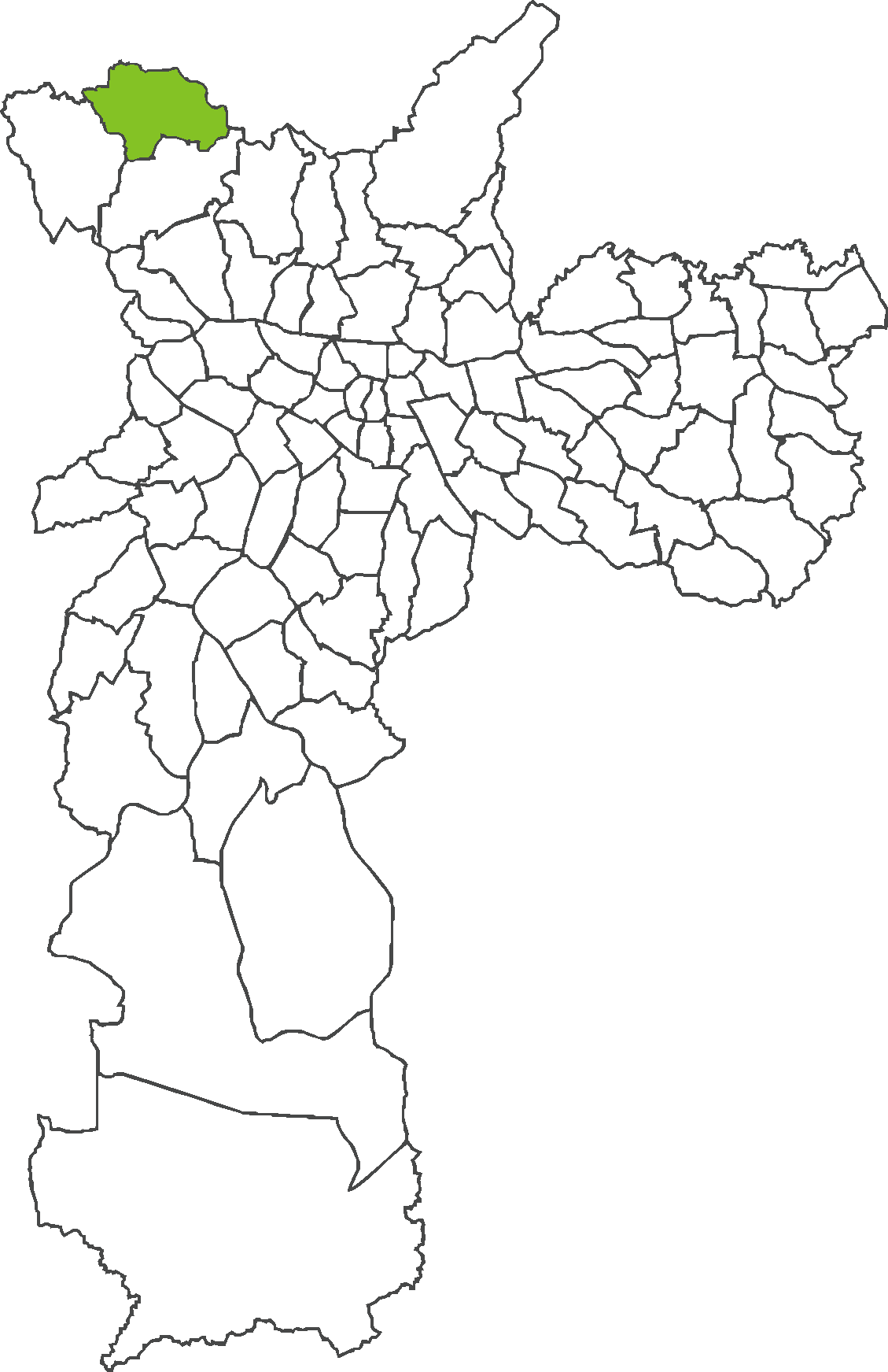 Localização do distrito de Perus no município de São Paulo.